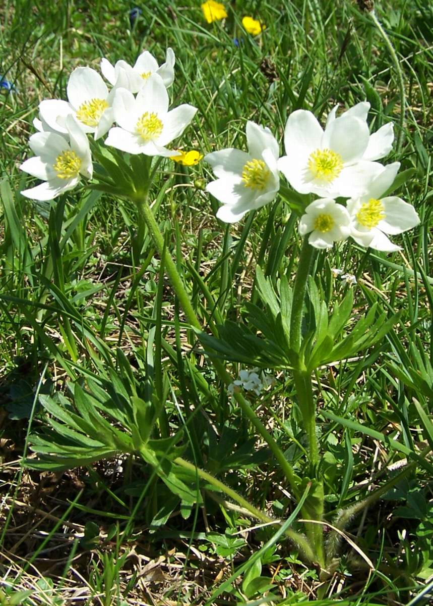 Anemone narcissiflora (pl. zawilec narcyzowy), habitat: Tatra Mountains , dolina Miętusia